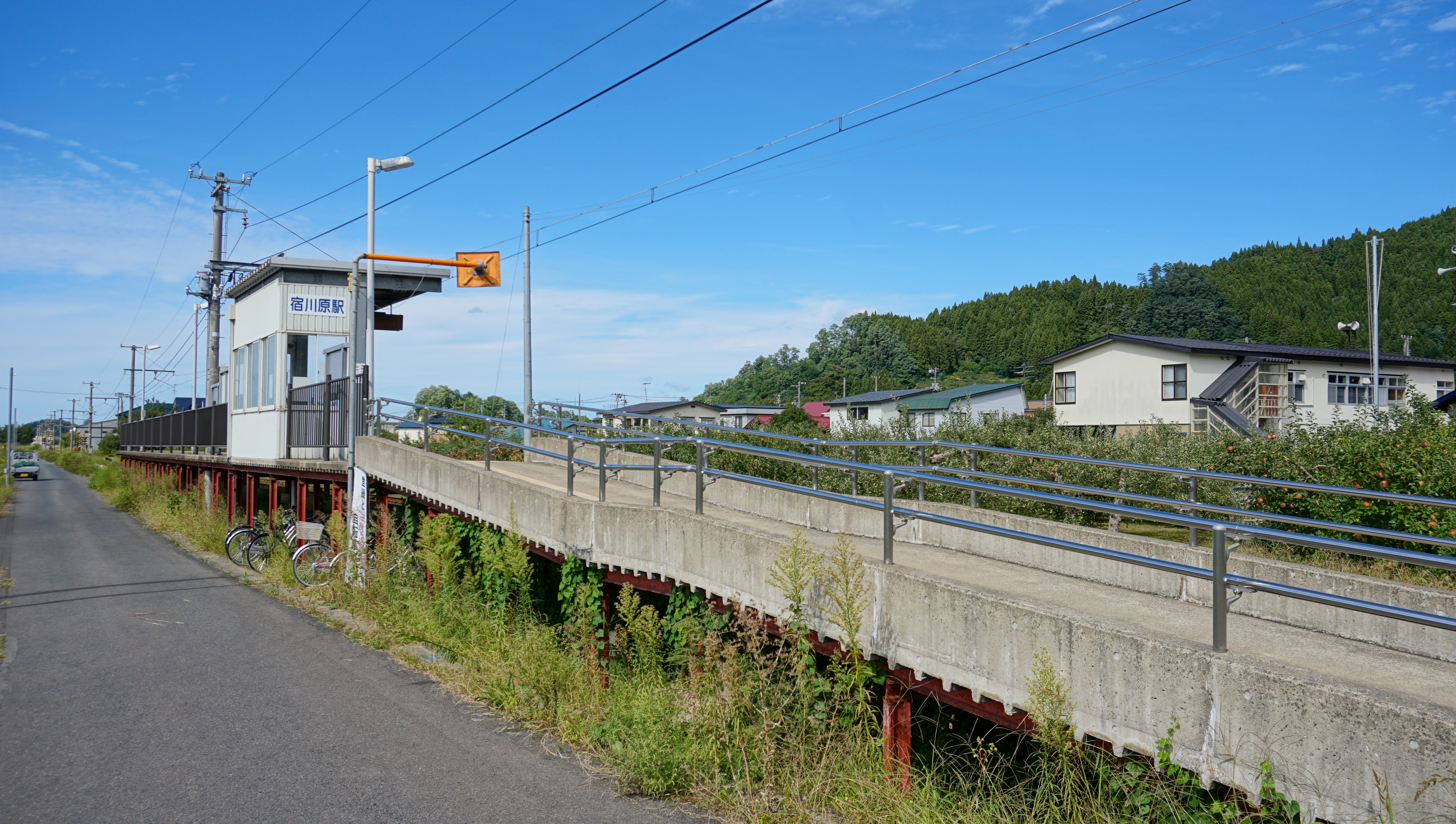 弘南鉄道大鰐線 宿川原駅